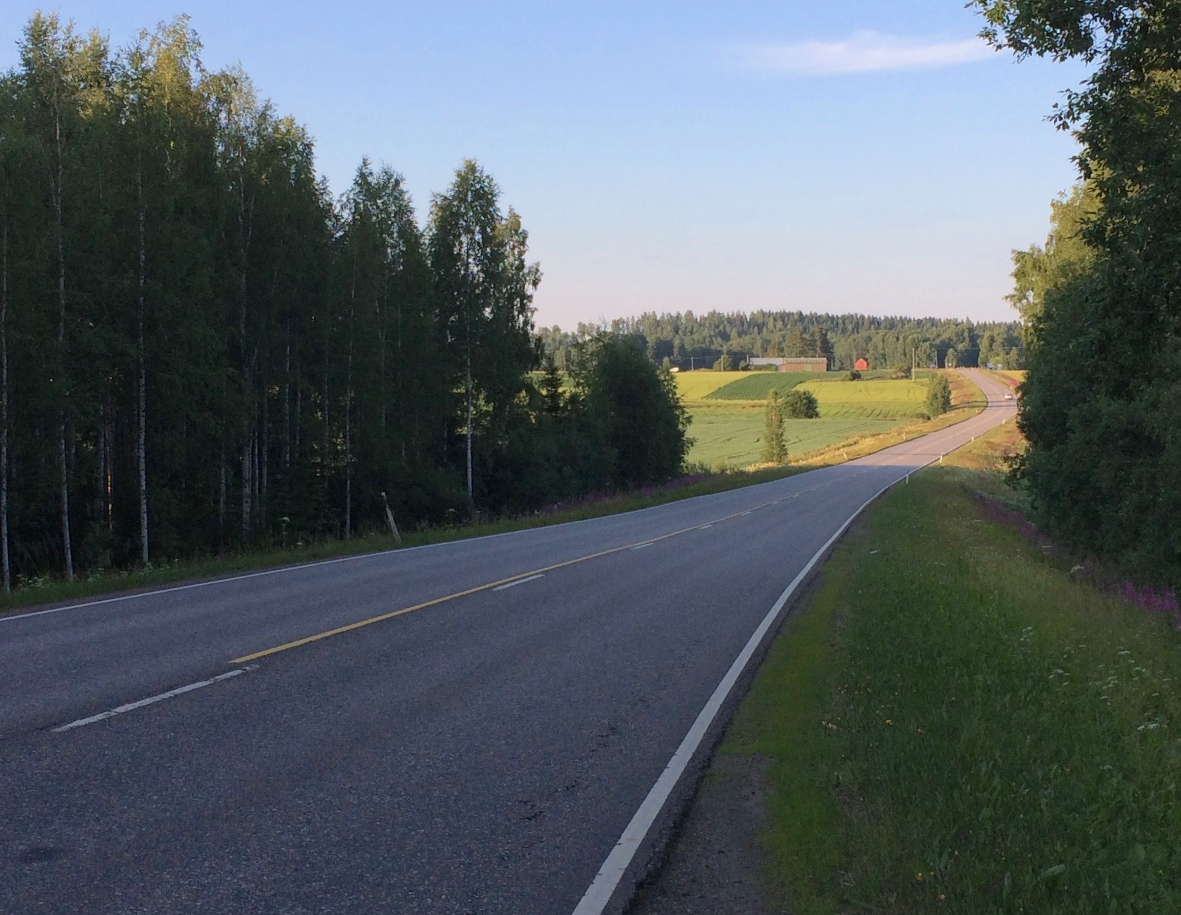 Kantatietä 53 pohjoiseen Hämeenlinnan Lammin Sankolassa.